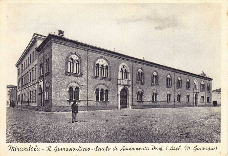 Mirandola - Regio Ginnasio-Liceo - Scuola di Avviamento Professionale (Arch. Mario Guerzoni)